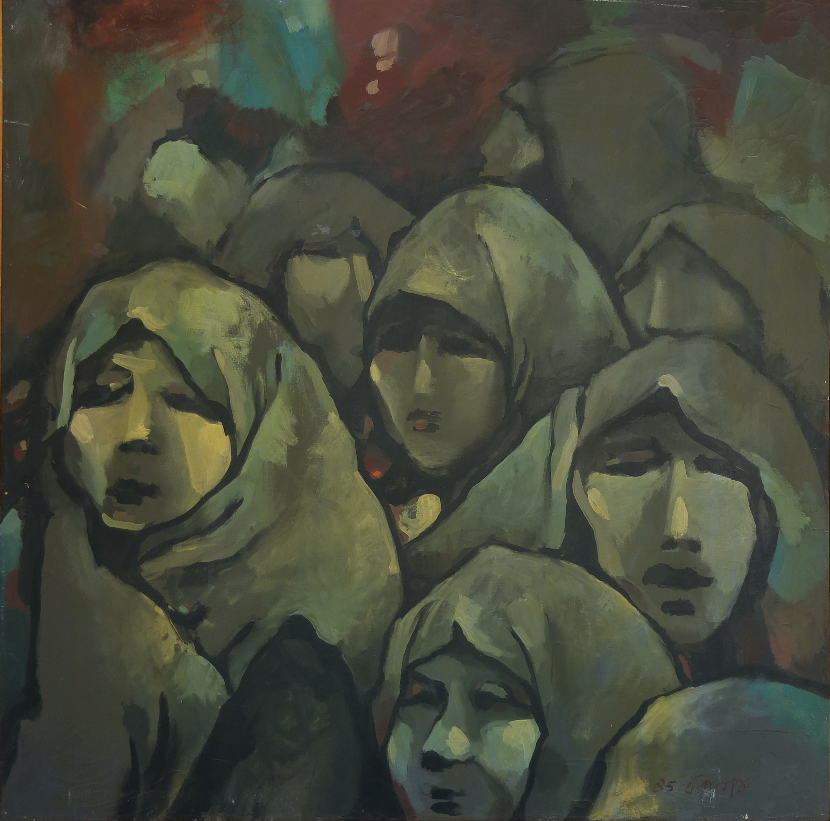 נשים ערביות, יעקב חייט